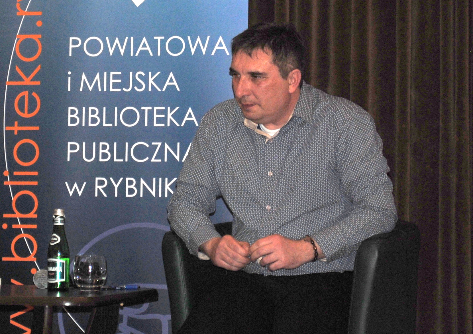 Evžen Boček na spotkaniu autorskim w Rybniku (10.03.2017)